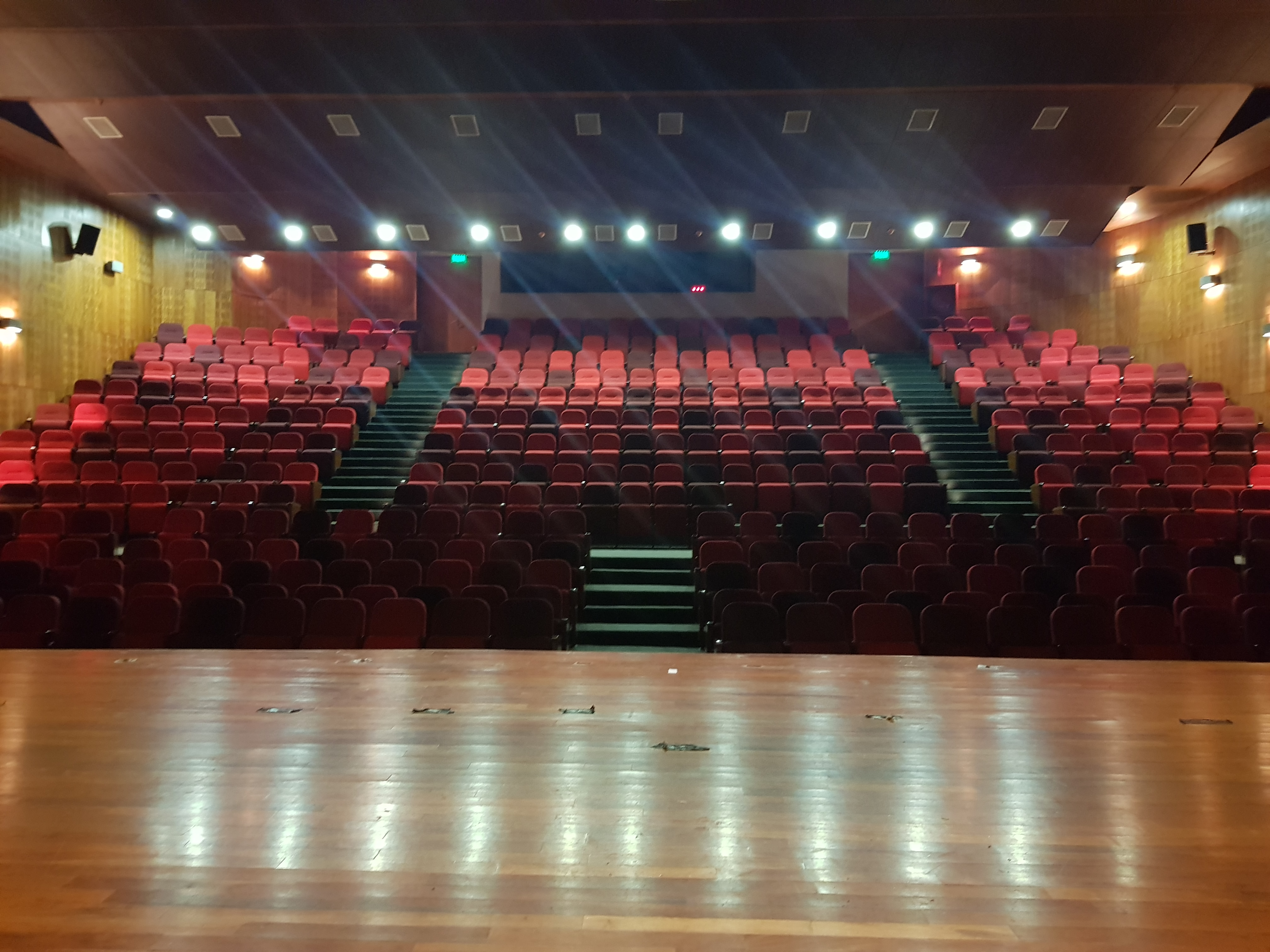 Fotografía tomada a las butacas en el área de teatro desde dentro del Centro Cultural Teatro Serrano de la Provincia de Melipilla, Región Metropolitana.